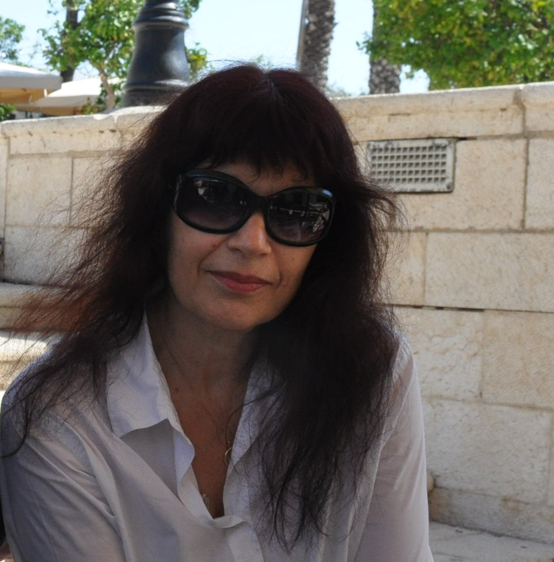 מתוך הסרט התיעודי "מבעד לעיניים – יוני המנחם"